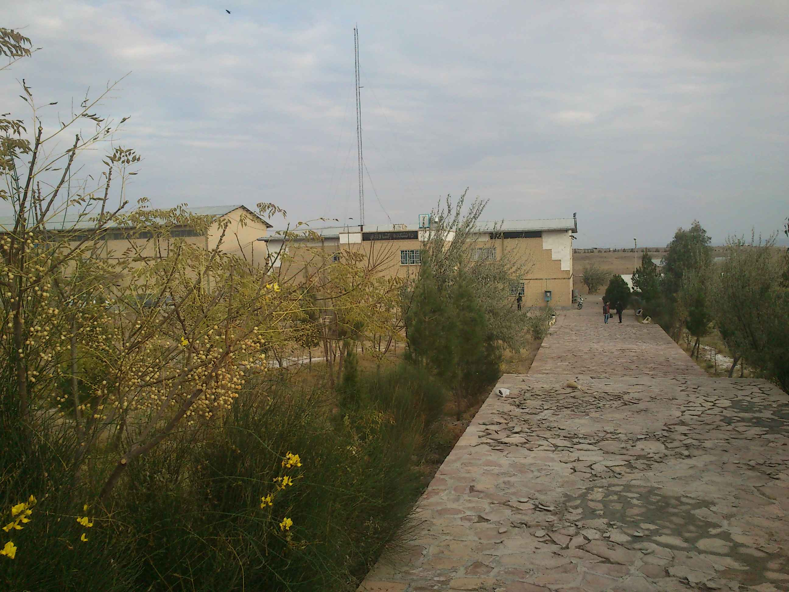 دانشکده کشاورزی